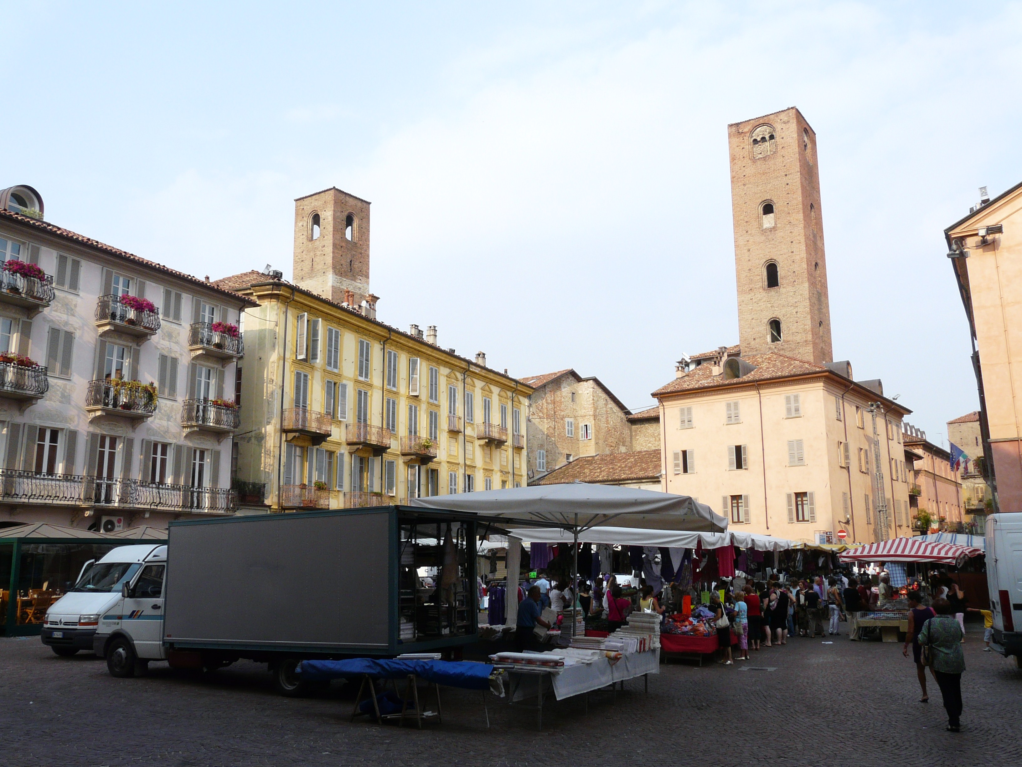 Piazza Risorgimento, Alba, Piemonte, Italia